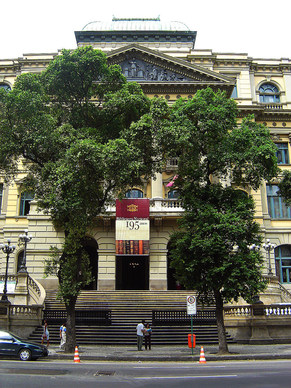 A Biblioteca Nacional do Rio de Janeiro.